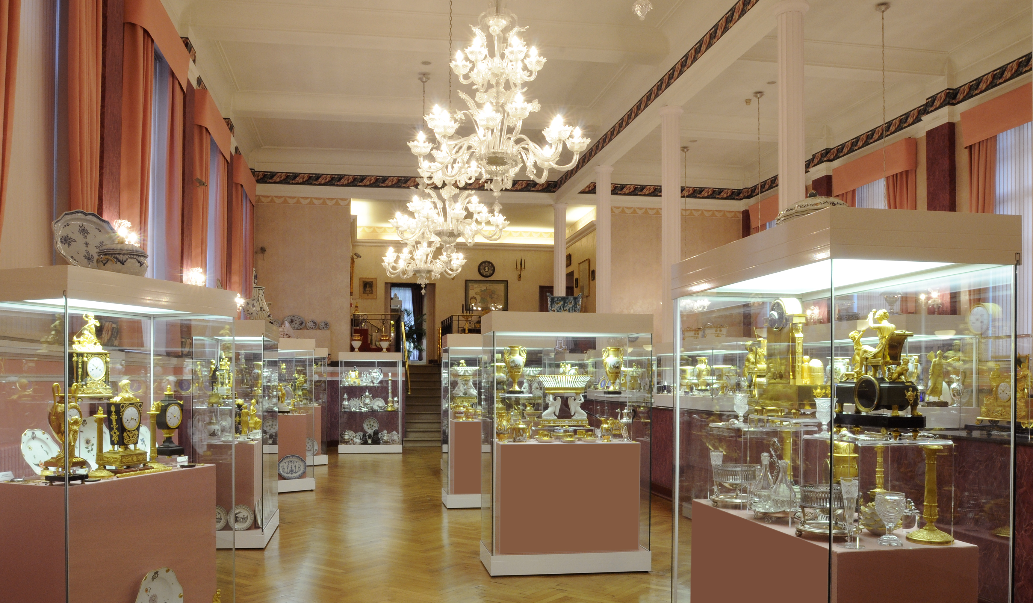 Cette image peut être utilisée et reproduite à volonté dans des conditions DIGNES et A LA CONDITION de mentionner expressément son origine à savoir de faire figurer la mention " Collections baron et baronne François DUESBERG"